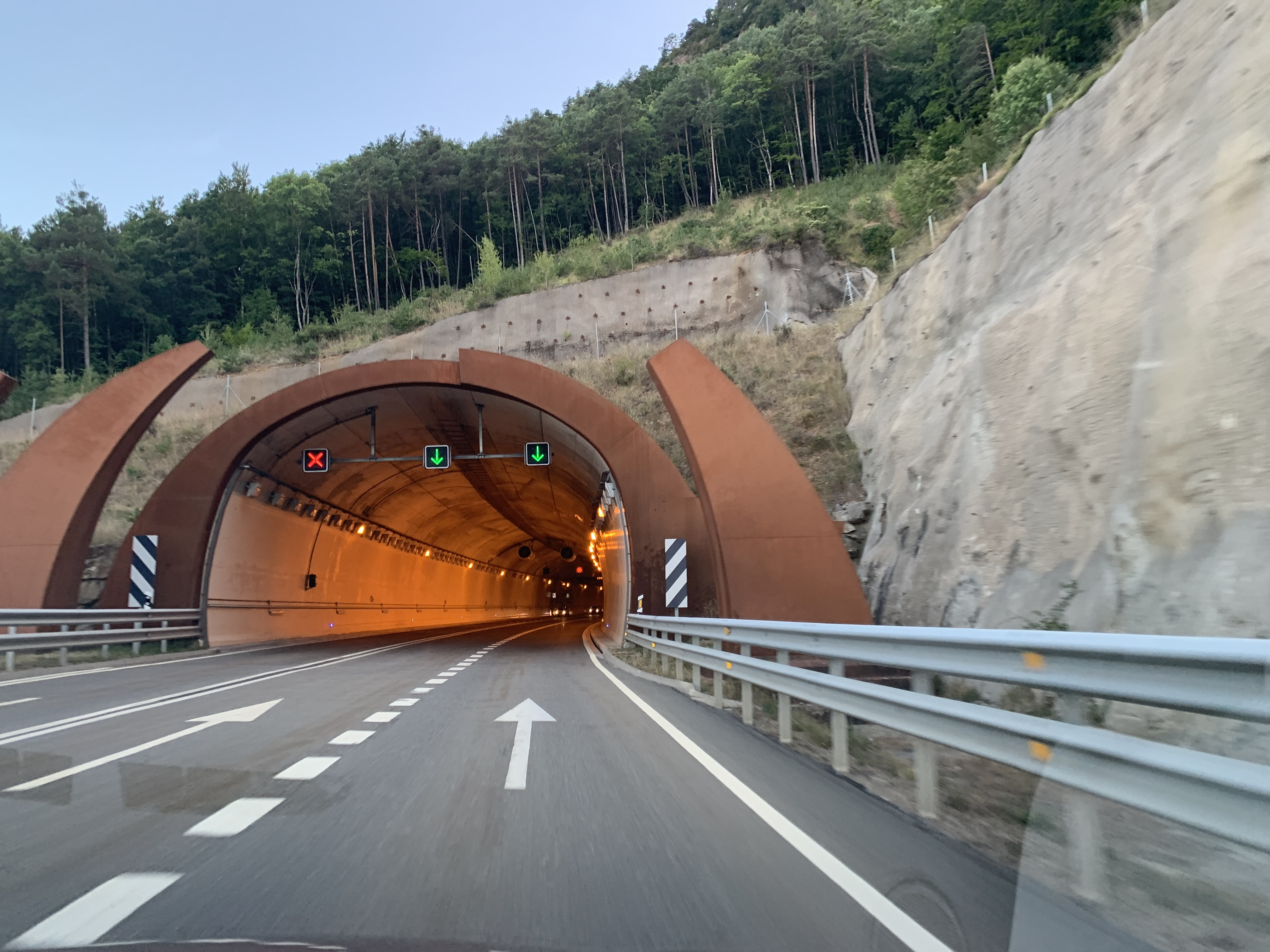 Entrada del túnel de Pedralba